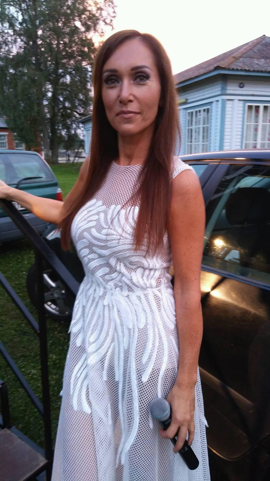 Käsmus